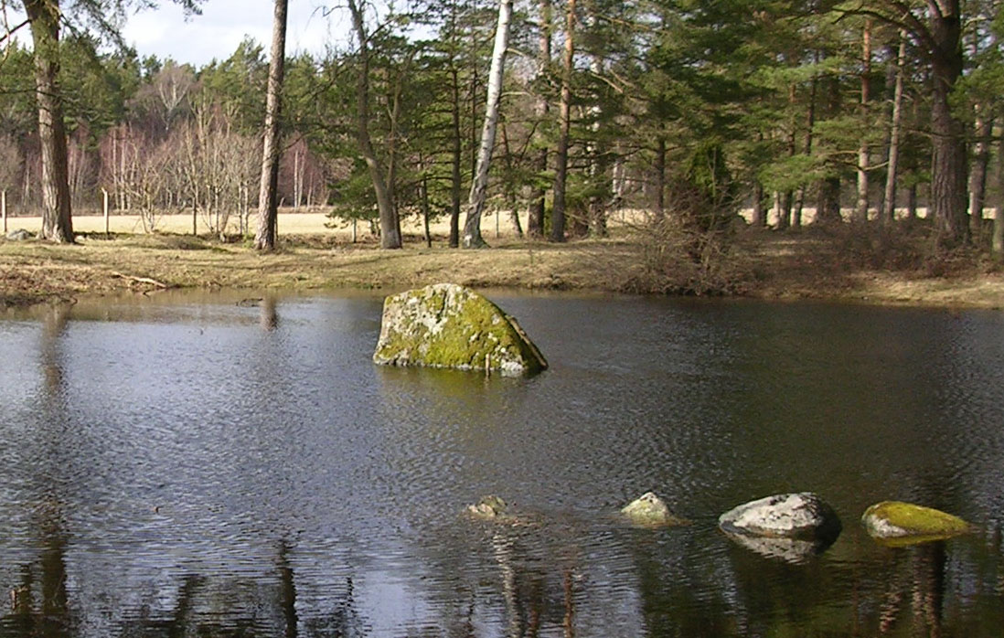 Brya Vattenhål Offerkälla